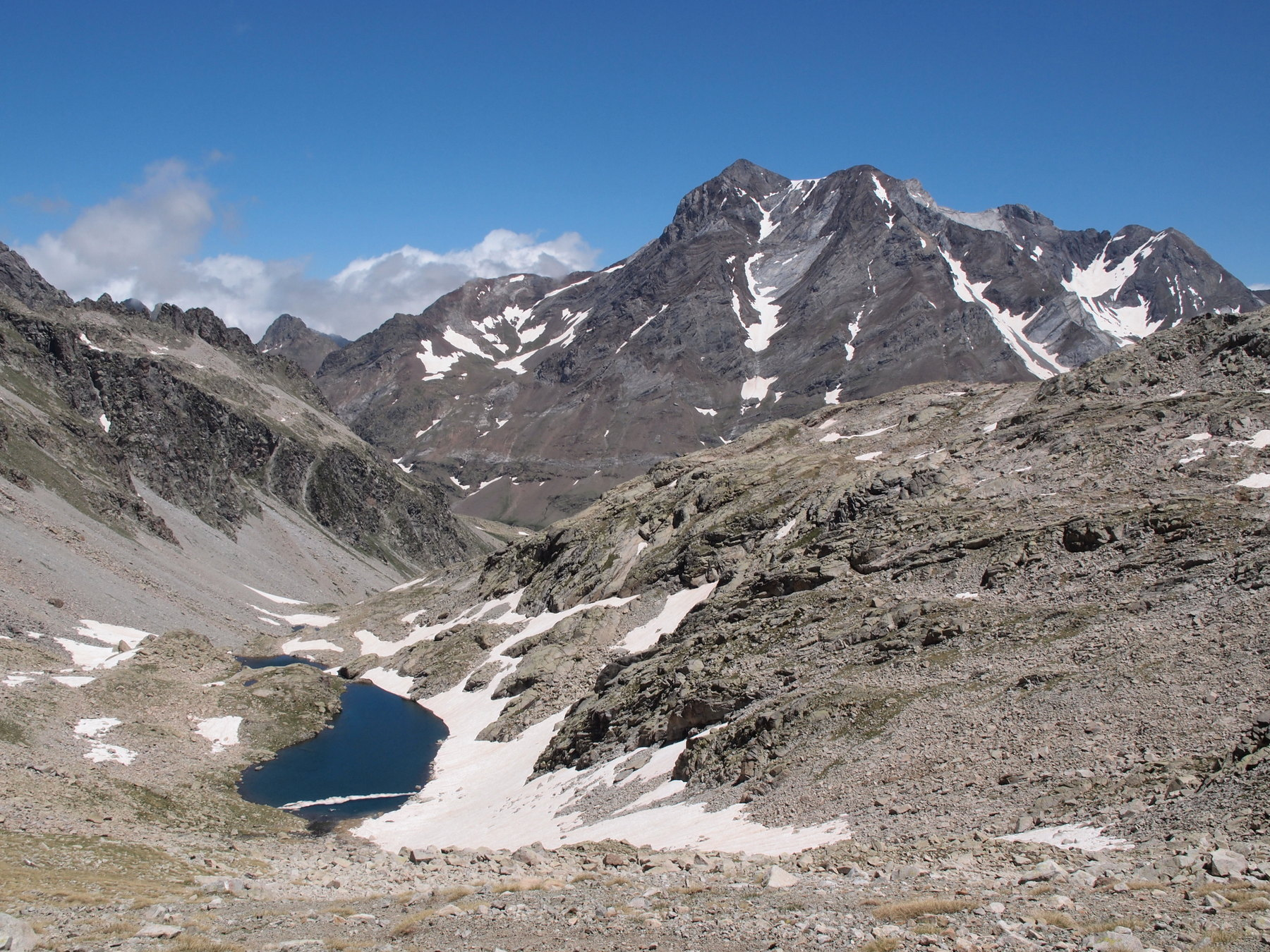 Puertos de Panticosa, Bramatuero y Brazatos: Picos de Clot de la Hount y Cerbillona del mazizo de Vignemale This is a photography of a Site of Community Importance in Spain with the ID: ES2410040. Natura2000 entry, EEA entry